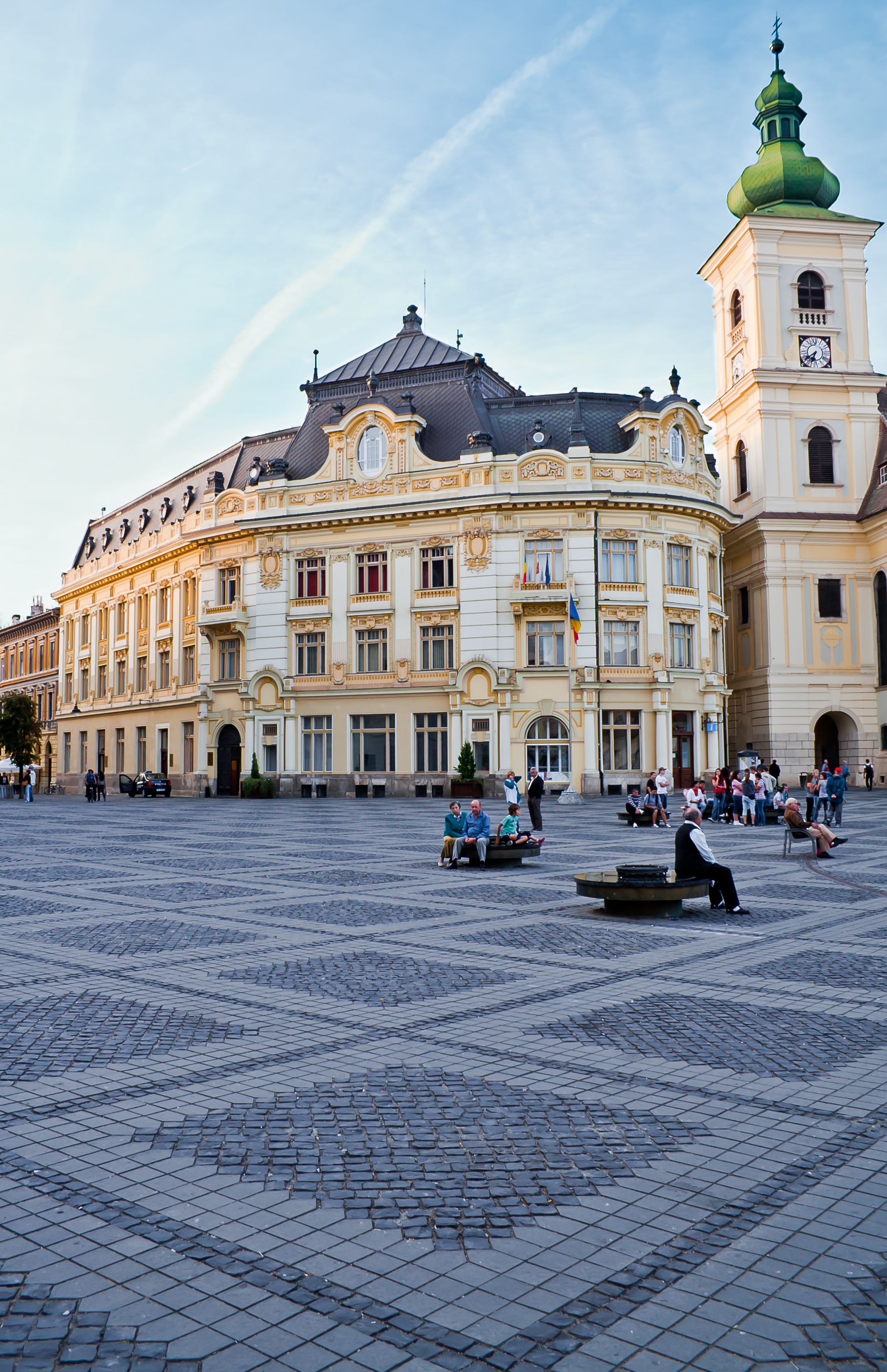 Primaria Sibiu si turnul bisericii romano-catolice, vedere din piata mare